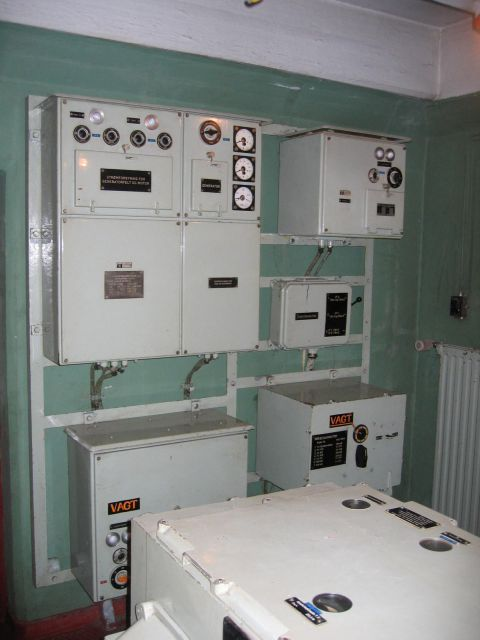 Stevnsfortet, ildledercentralen